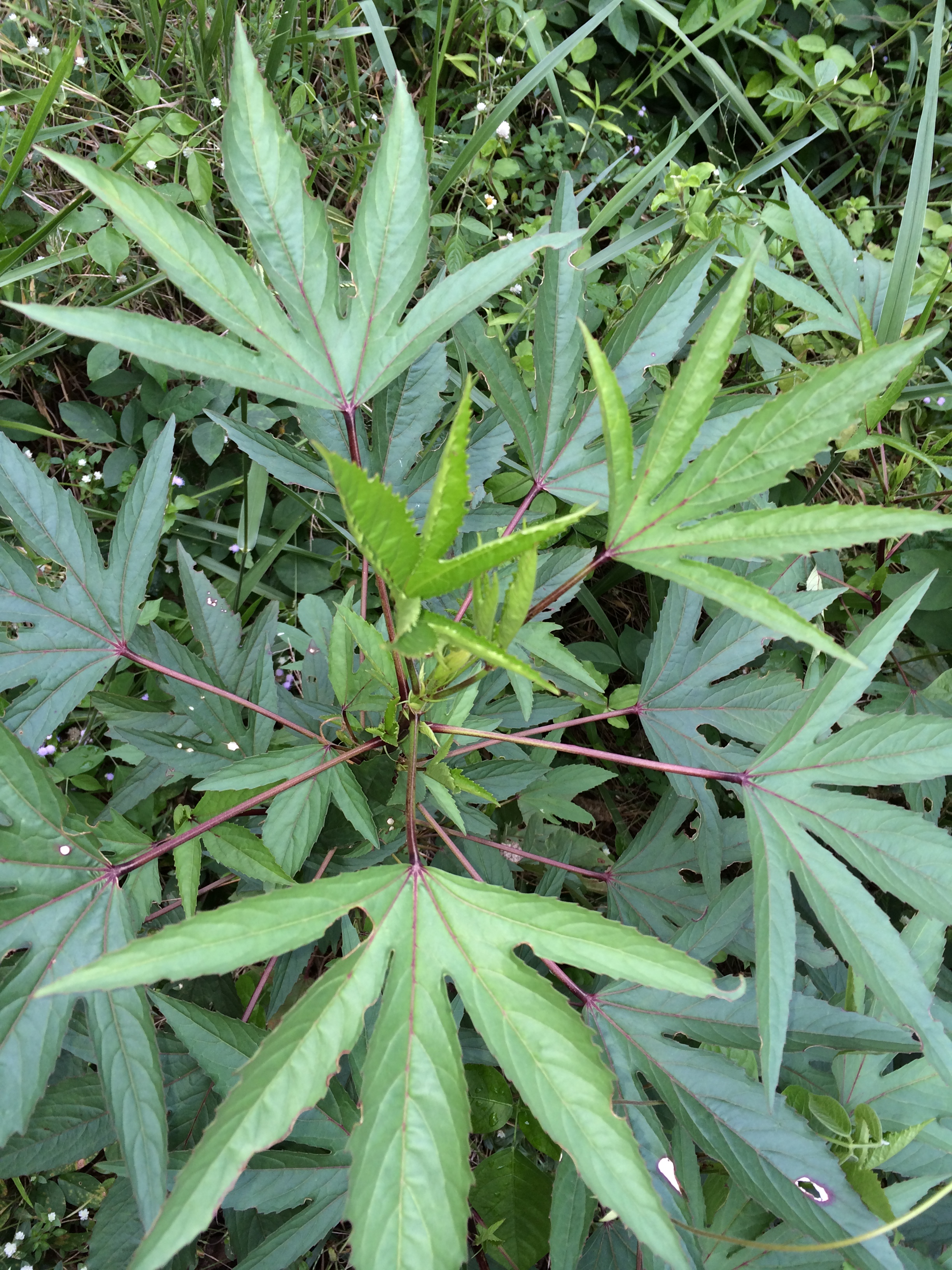 Hibiscus sabdariffa Gah jiap กระเจี๊ยบ ou roselle